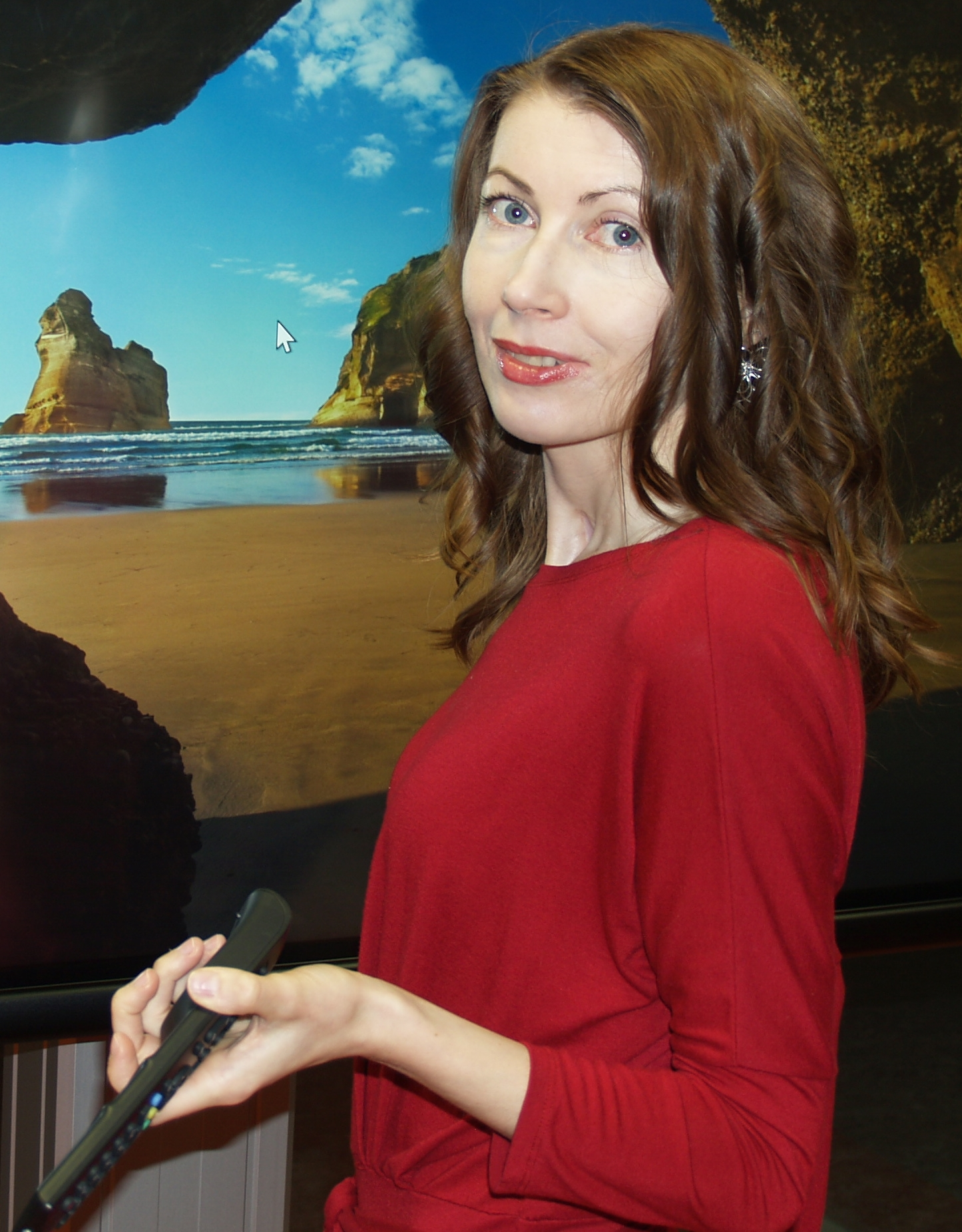 Fotol on kujutatud Siiri Pärksonit interaktiivse ekraani ees esitlemas oma tööd. Tegemist on Eesti Kirjandusmuuseumi 4. korruse seminariruumiga.